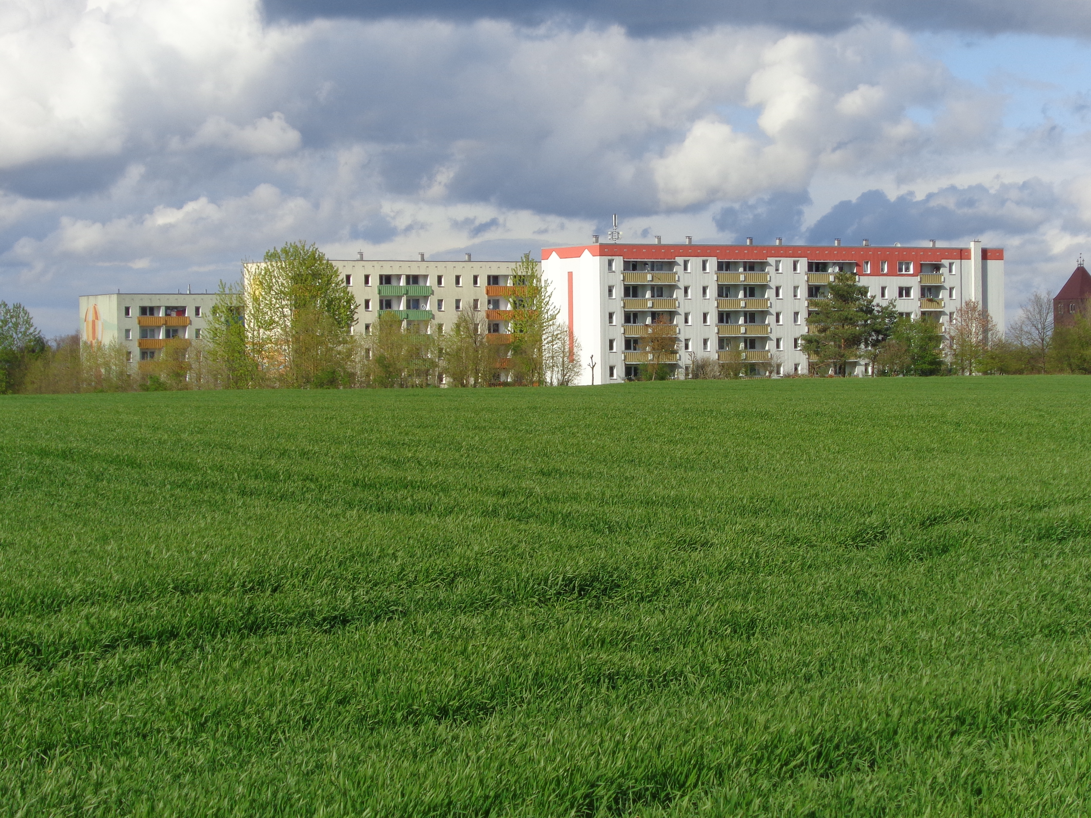 Siedlung Vogelsang am Südrand von Plau am See